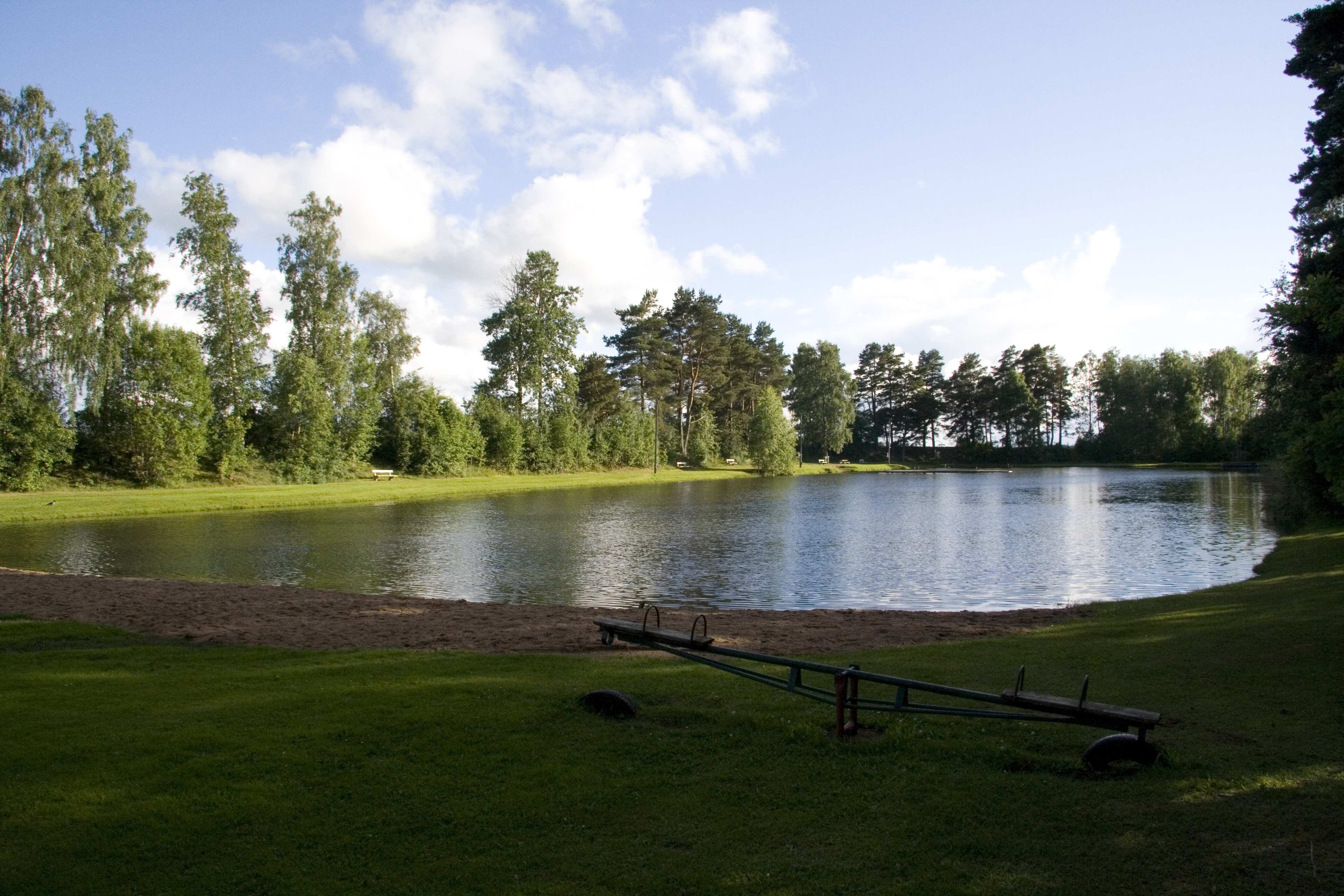 Järpås badsjö, Lidköpings kommun.